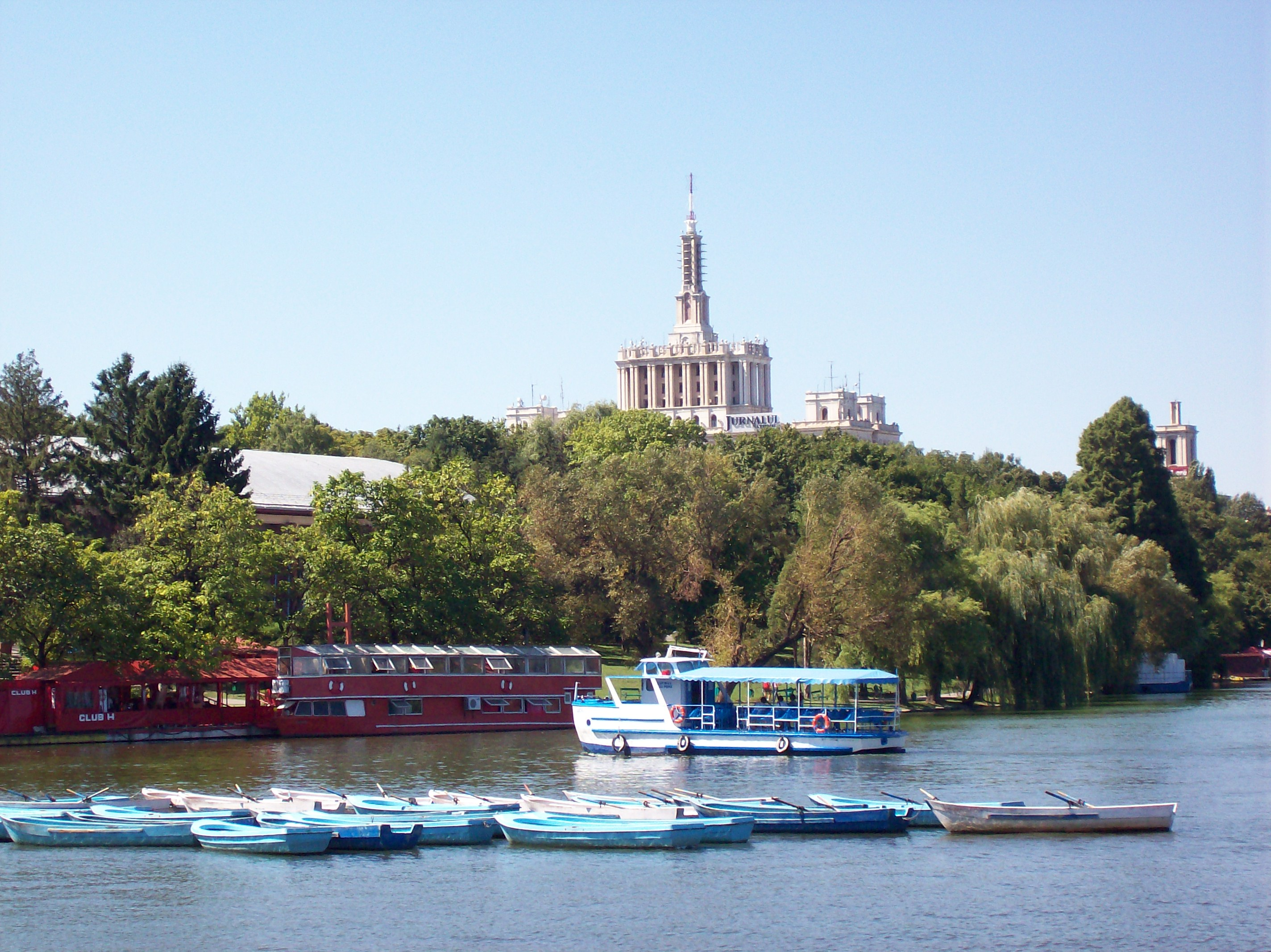 zomer 2006. Zelfgemaakt. Boekarest. Herăstrăupark.